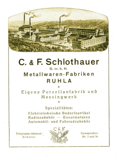 Stilisierte Werbeanzeige für die Ruhlaer Firma C&F Schlothauer. Die dargestellte Werksansicht ist freie Phantasie - das Ruhlaer Werk befindet sich in einem engen Talgrund.